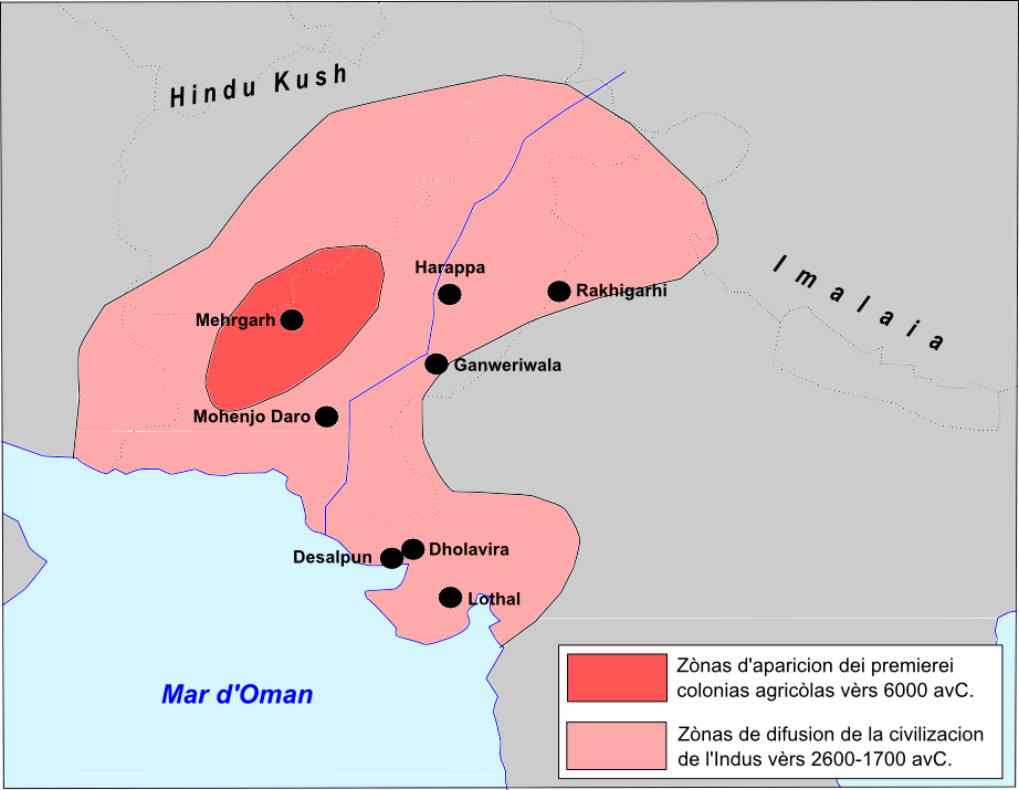 Extension de la civilizacion de l'Indus.